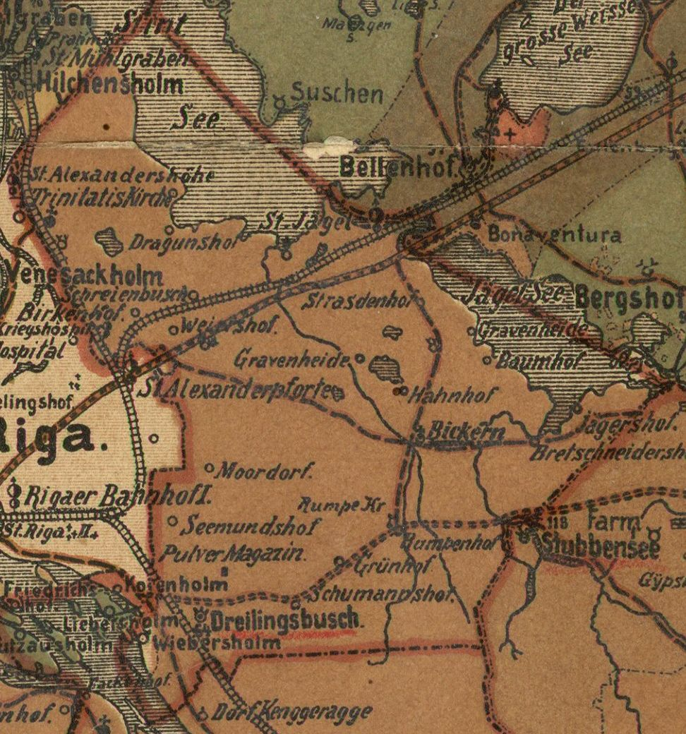 Biķernieki kihelkonna mõisad 1905. aasta kaardil